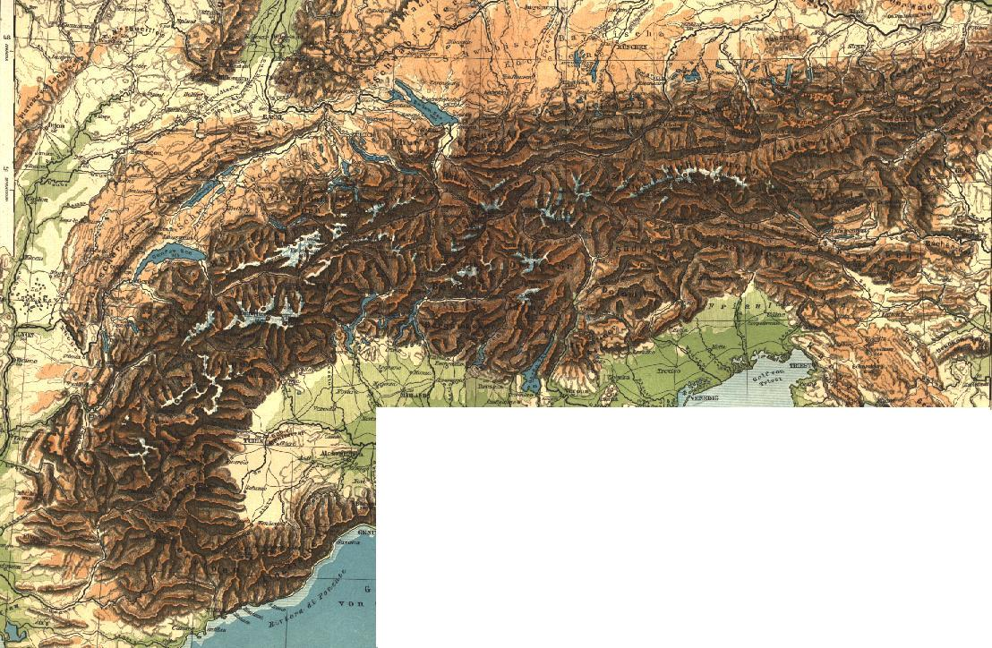 Carte géographique des Alpes.